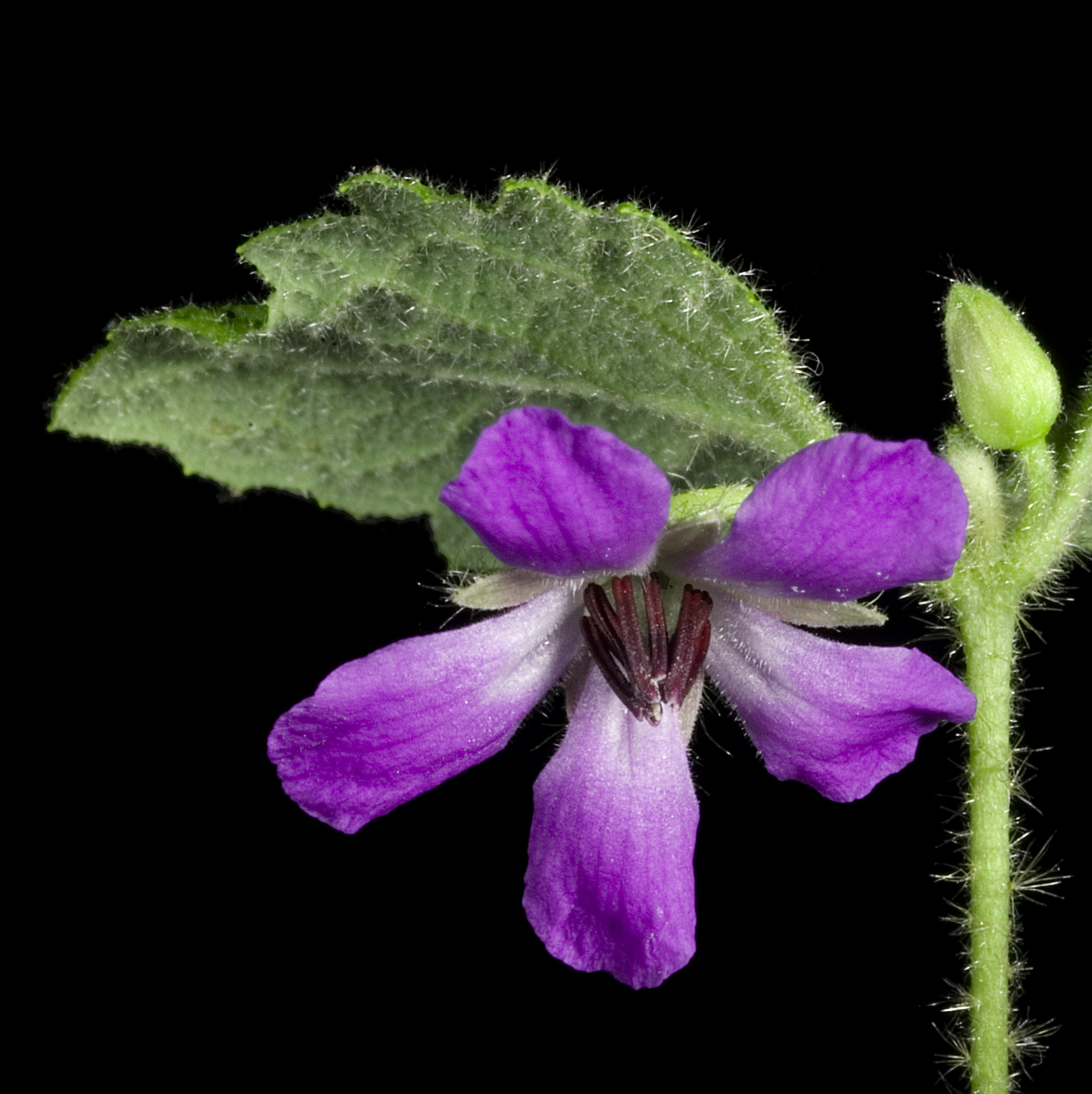 KRT3176